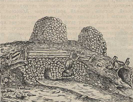 Беларуская (тарашкевіца): Грэск (Hresk). Вапнавыя печы